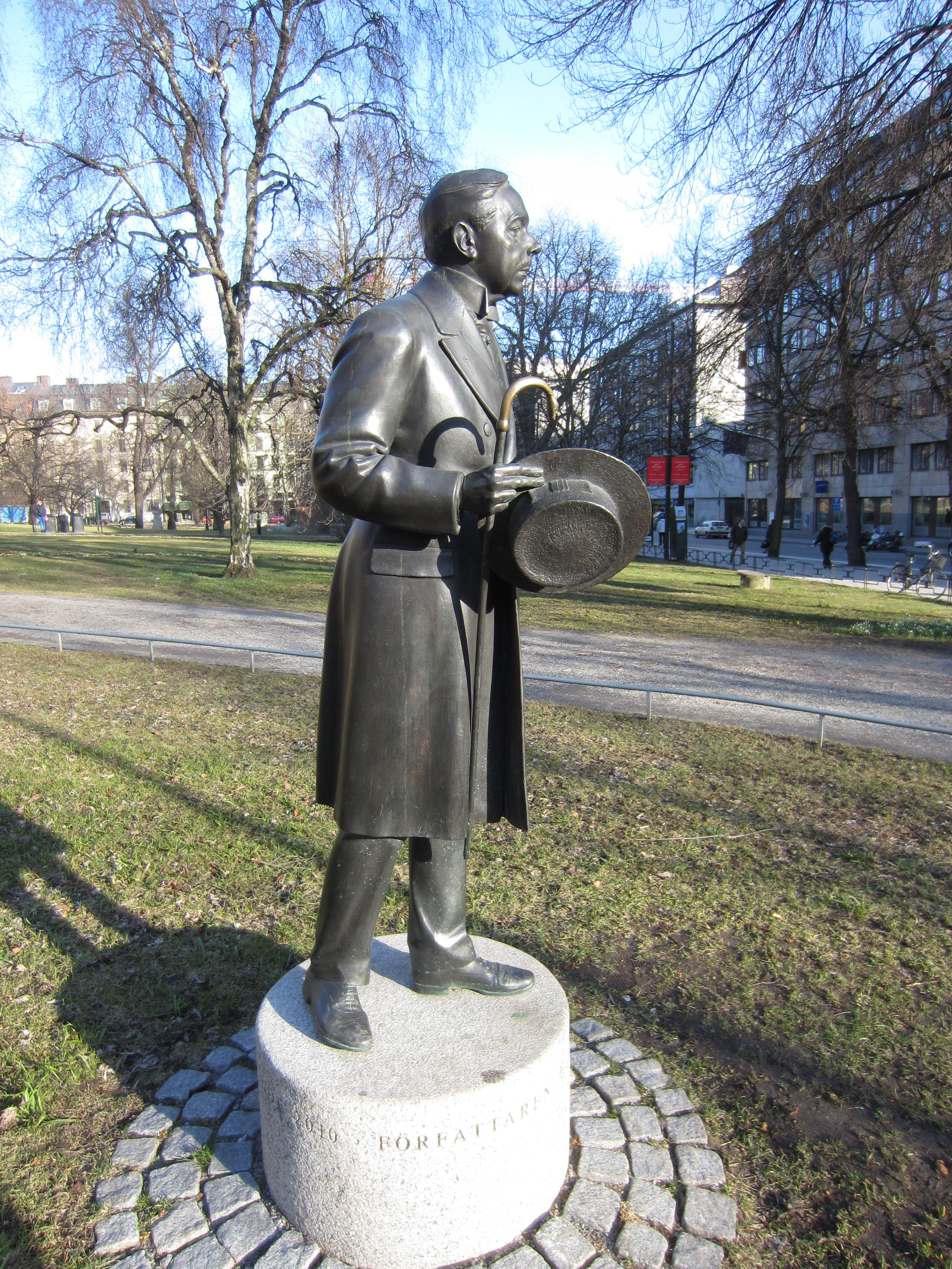 Staty i brons av Peter Linde f. 1947. Gåva till Stockholms stad från Söderbergsällskapet den 11 september 2010.